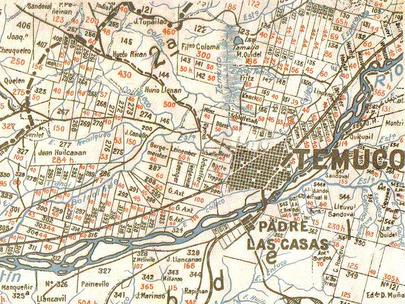 Plano general de la colonización de Cautín por Nicanor Bologna, editado en 1910.